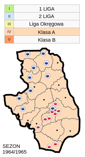 Jagiellonia w sezonie 1964/65- mapa klubów